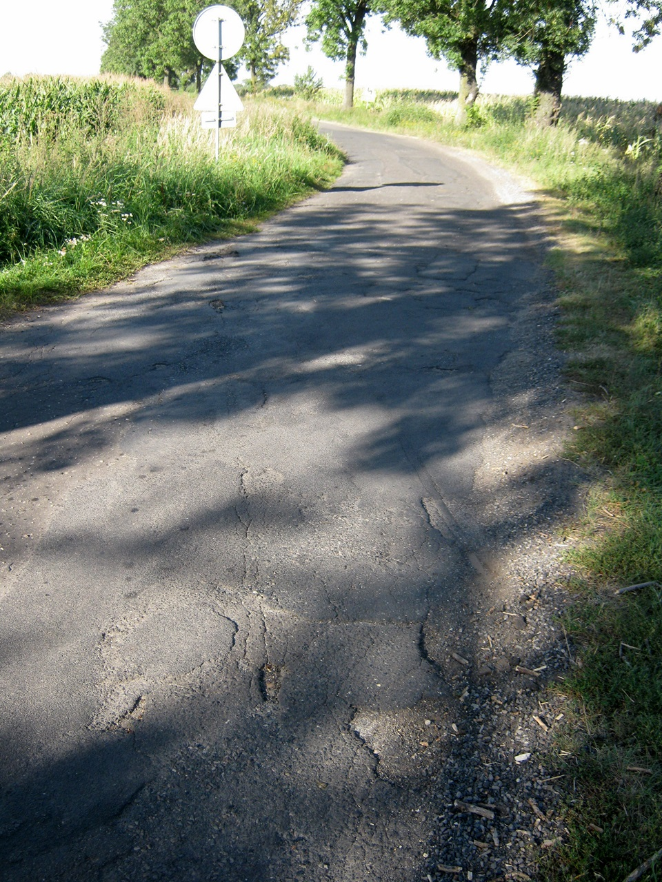 Resztki przejazdu kolejowego za miejscowością Mierzewo w ciągu drogi Mierzewo- Grzybowo (uchwycony jadąc od Mierzewa)